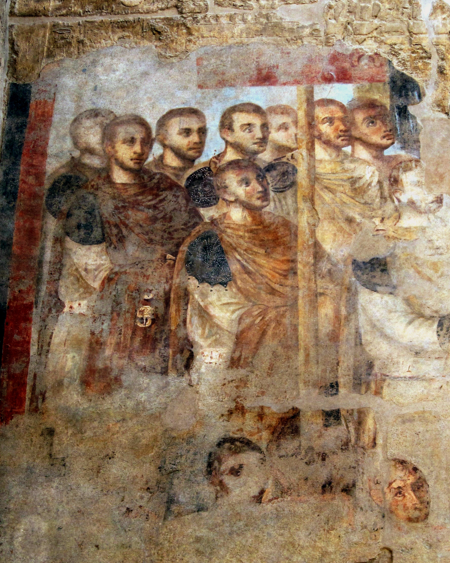 Fresken im Inneren des Tempels von Luxor, Ägypten